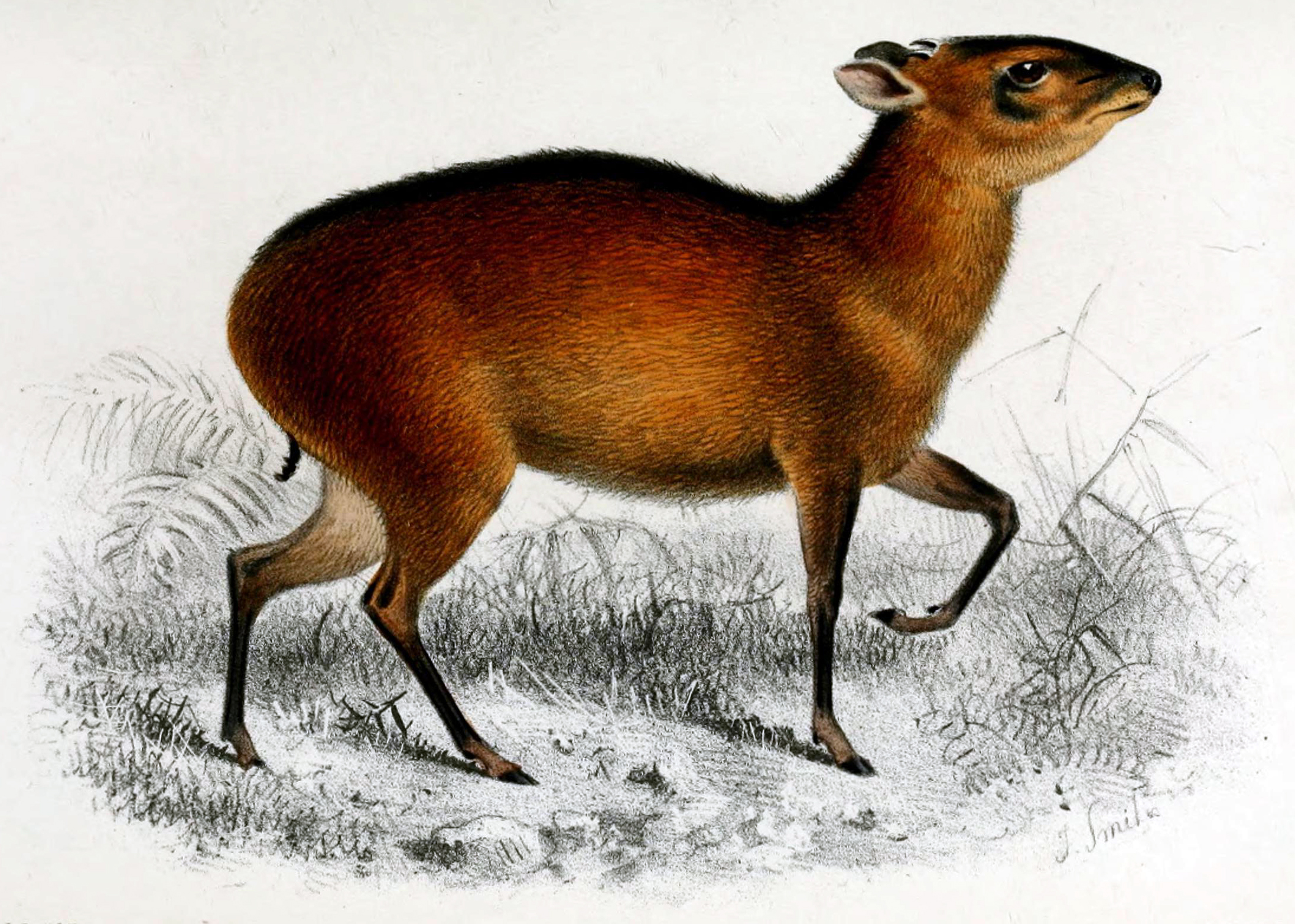 Cephalophus dorsalis.